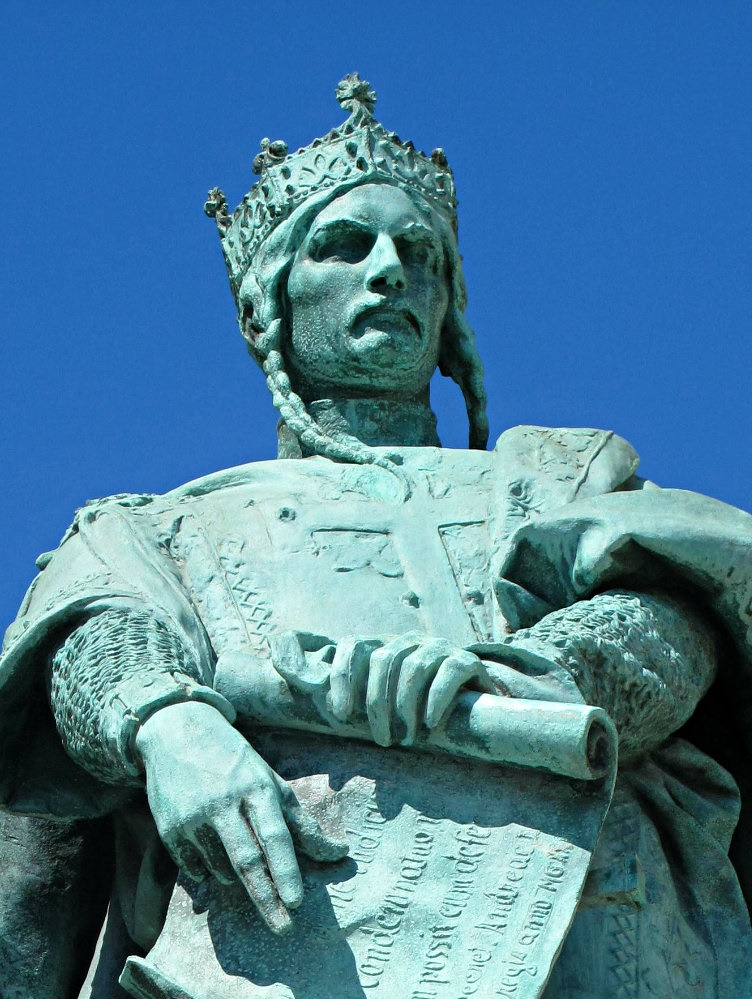 II. András szobra a Hősök téri Millenniumi emlékművön, Budapesten